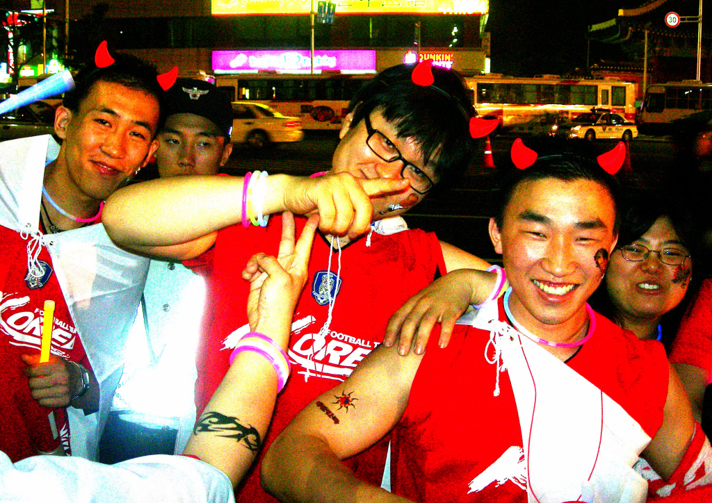 "Red Devils".